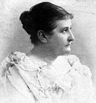 Schriftstellerin Dore Duncker